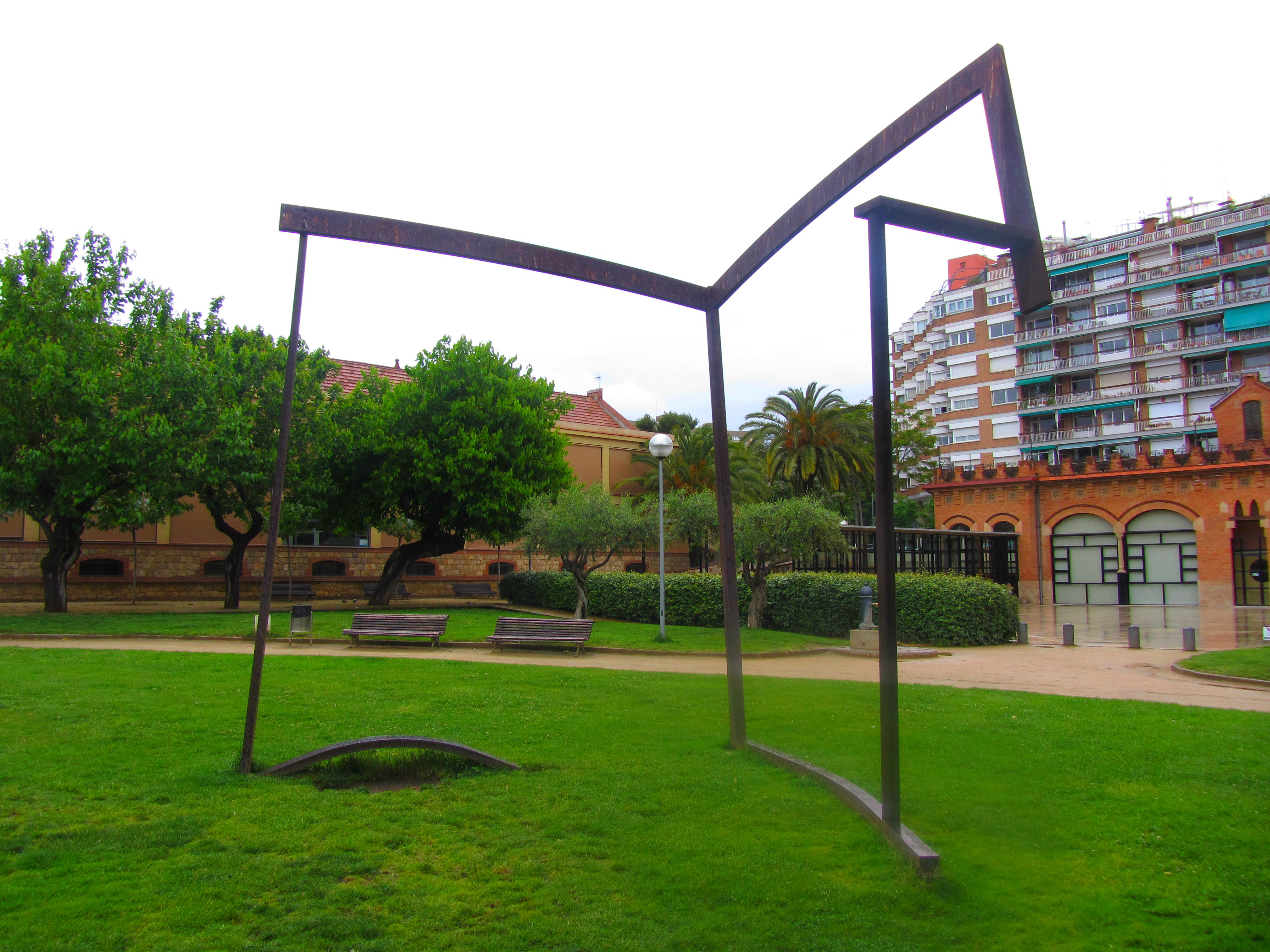 Límit interior (Sergi Aguilar). Jardins de la Maternitat (Barcelona)